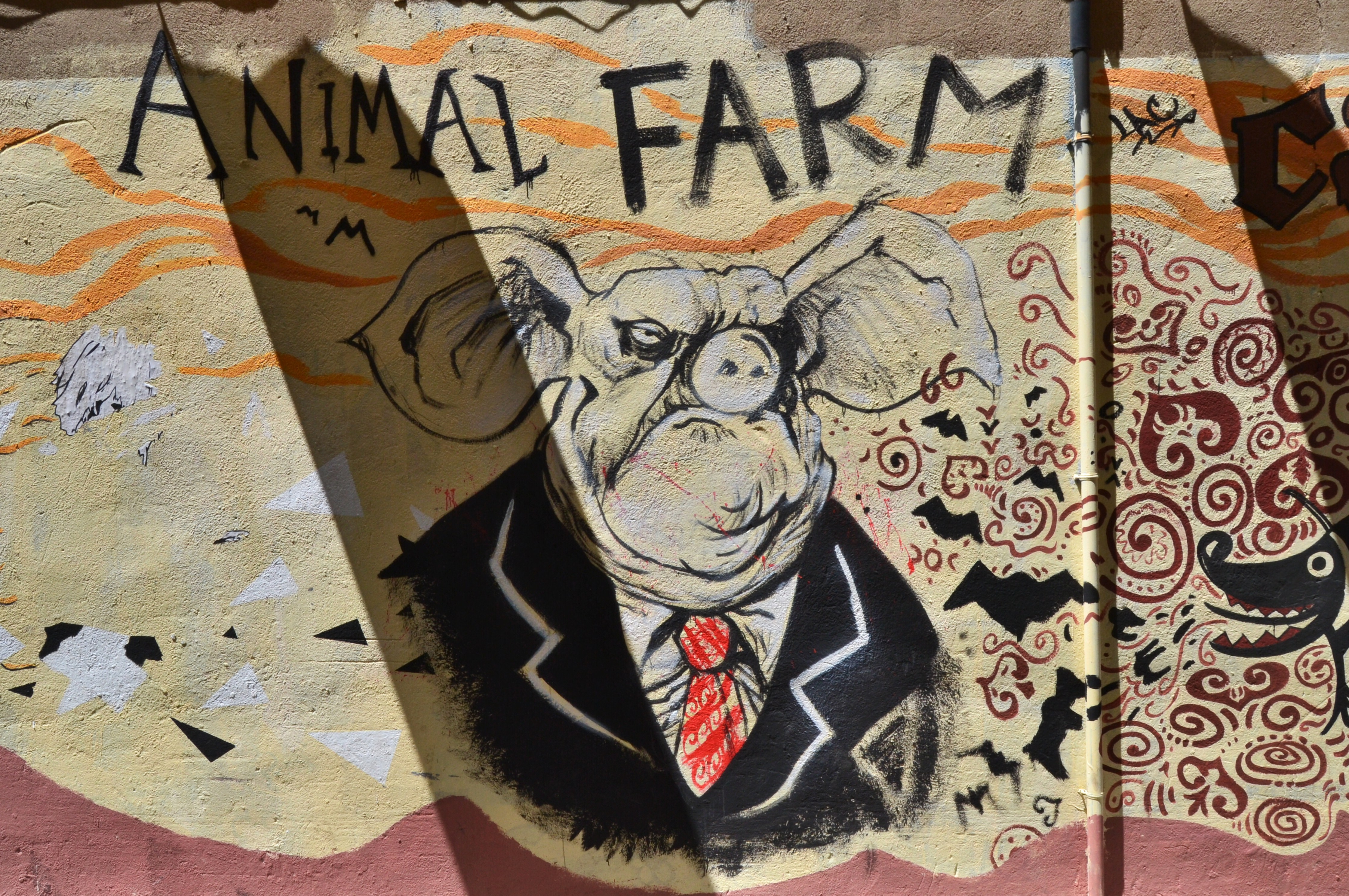 Mural Canvi, Animal Farm.